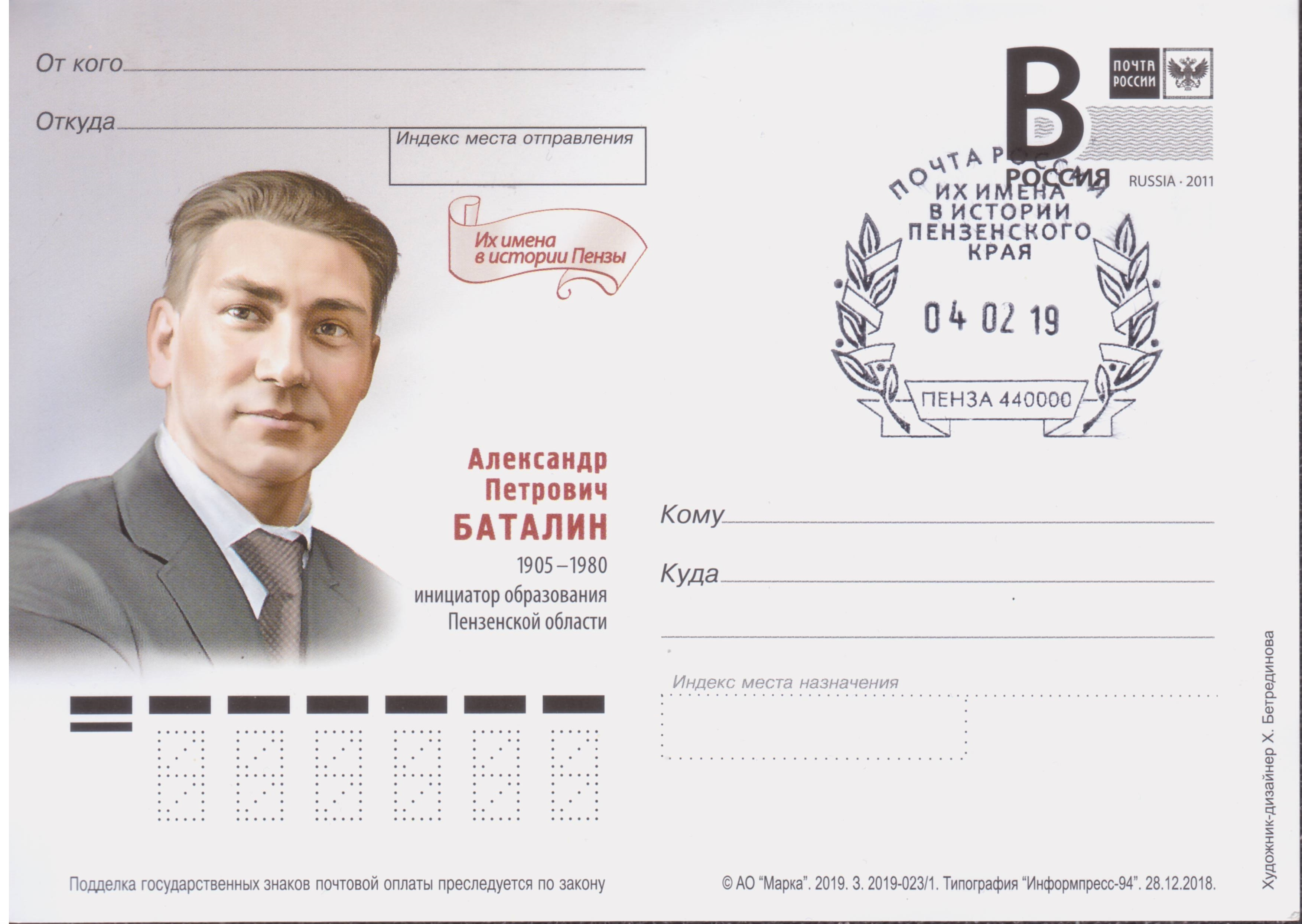 Почтовая карточка № 2019-23/1. Их имена в истории Пензы. Александр Петрович Баталин (1905-1980), инициатор образования Пензенской области (гашёная)